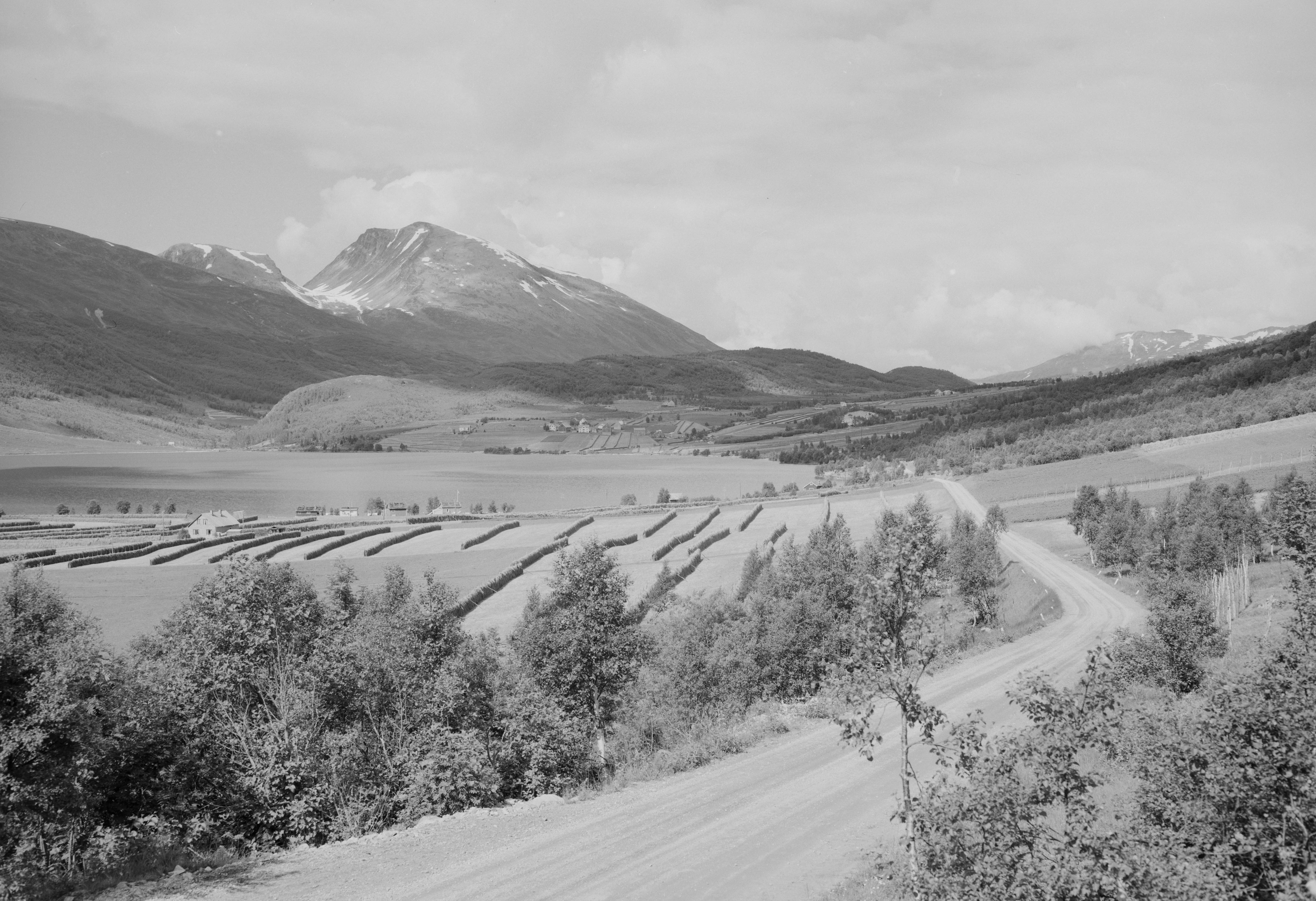 Bildet er hentet fra Nasjonalbibliotekets bildesamling Eidsdal, Nesset, Møre og Romsdal